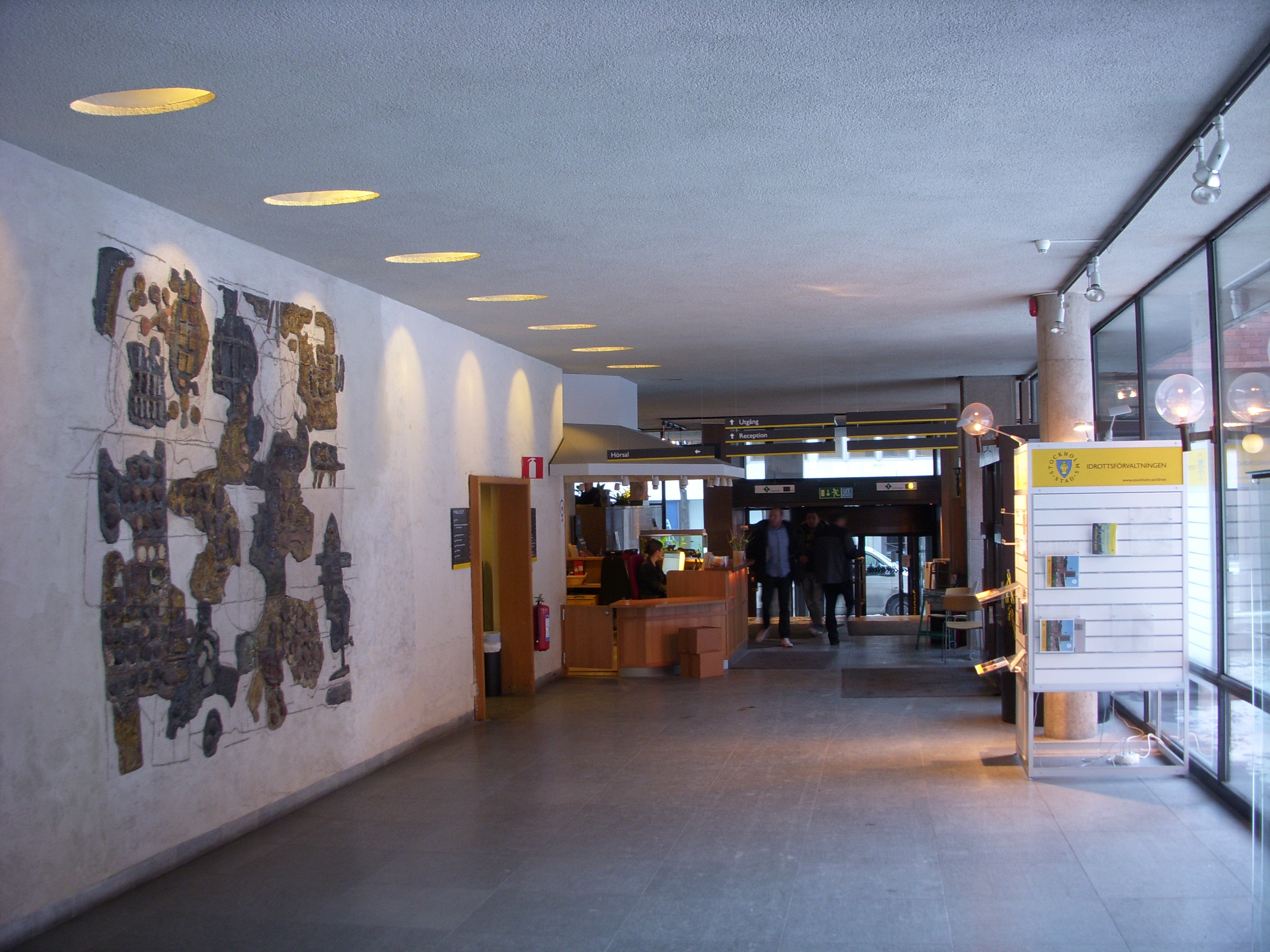 Tekniska Nämndhuset i Stockholm, Kungsholmen